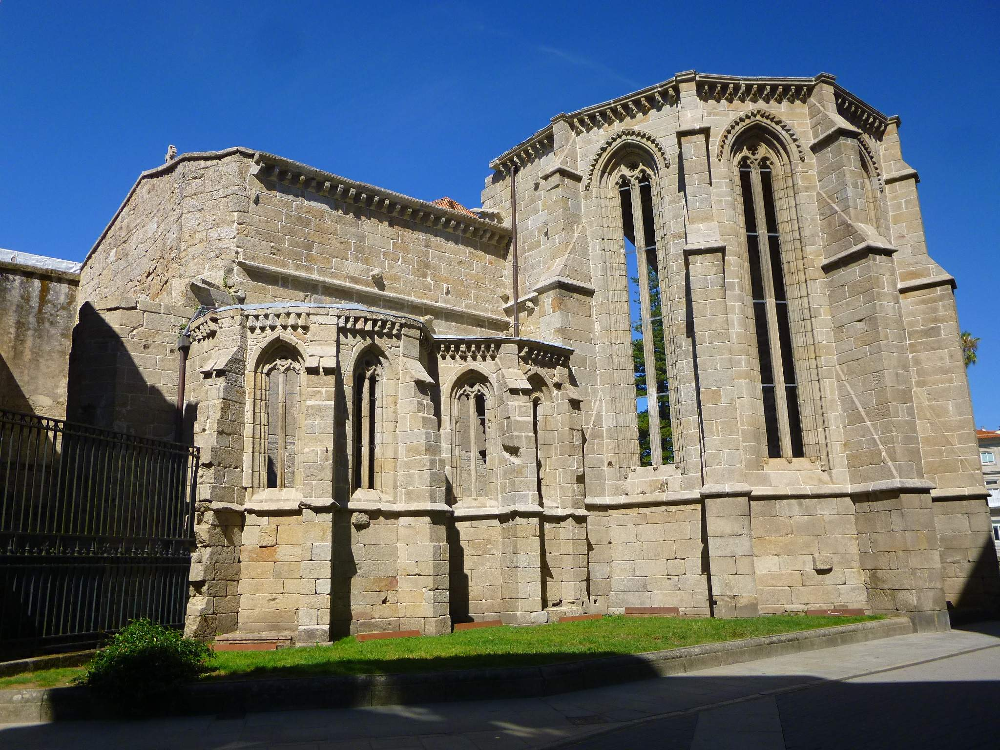 Pontevedra - Convento de Santo Domingo